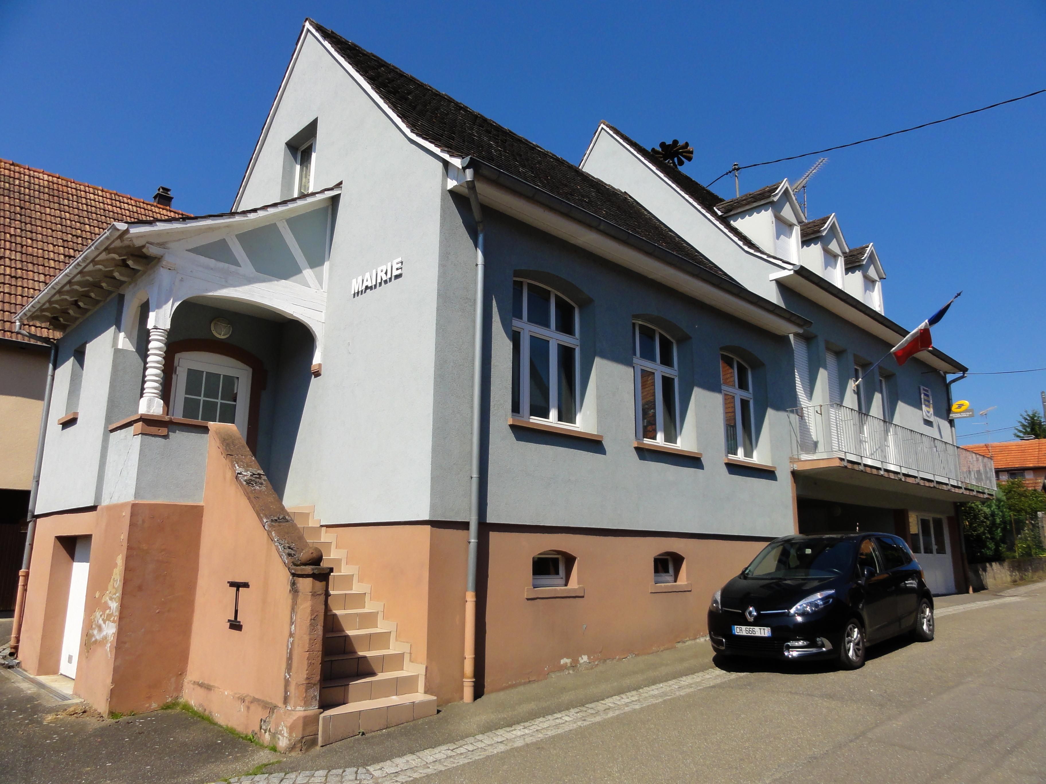 Alsace, Bas-Rhin, Uhrwiller, Mairie (XXe), 1 rue de la Mairie.